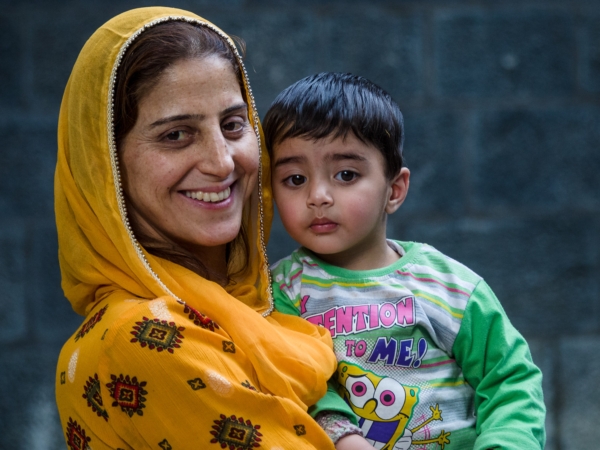 Kashmiri Lady and Son